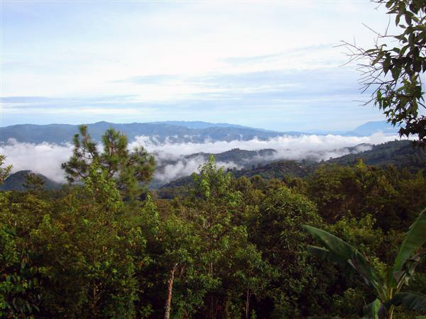 Landscape near Pedernales, La Paz department, Honduras